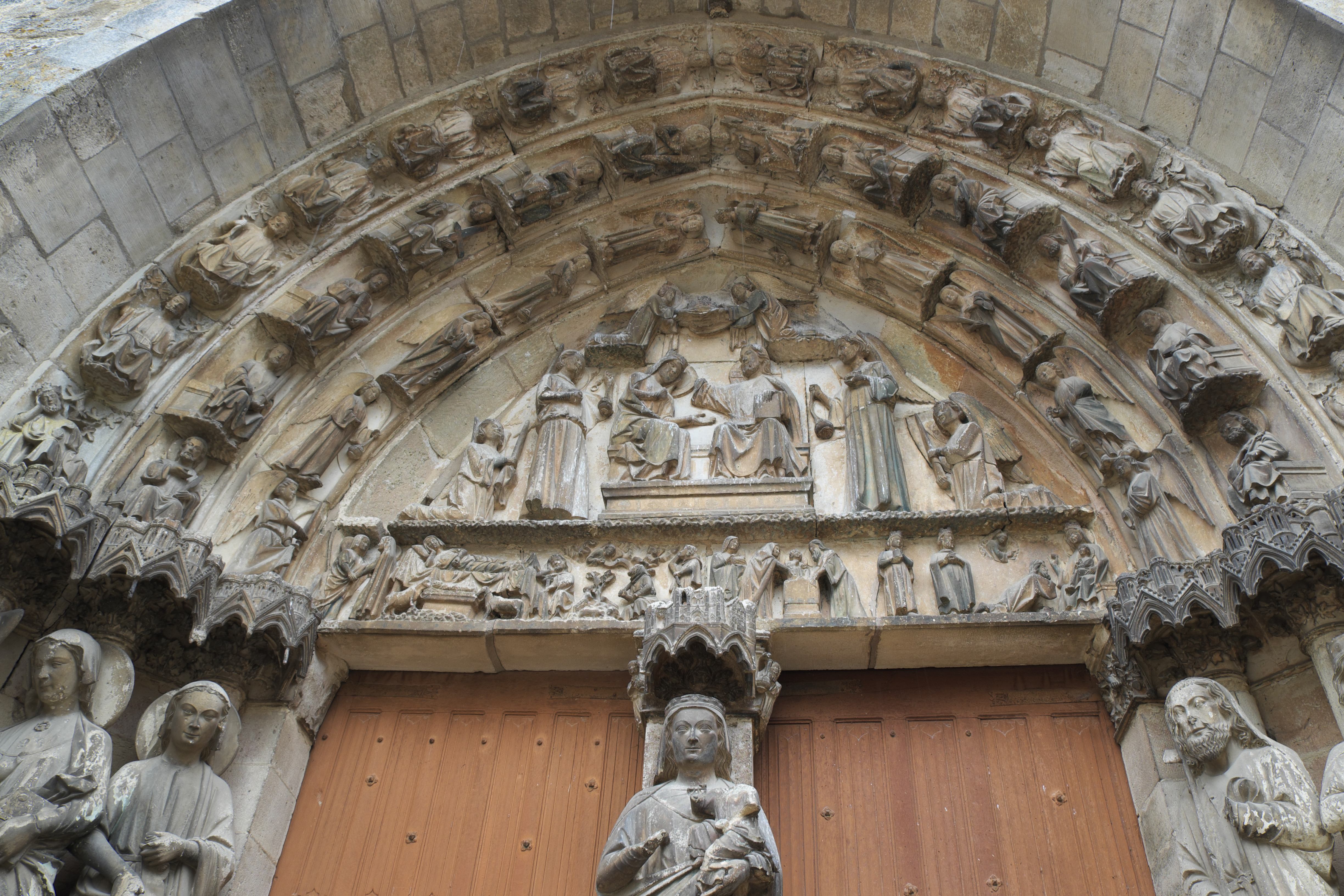 Katholische Kirche Notre-Dame in Villeneuve-l'Archevêque im Département Yonne (Burgund/Frankreich), Westportal, Tympanon